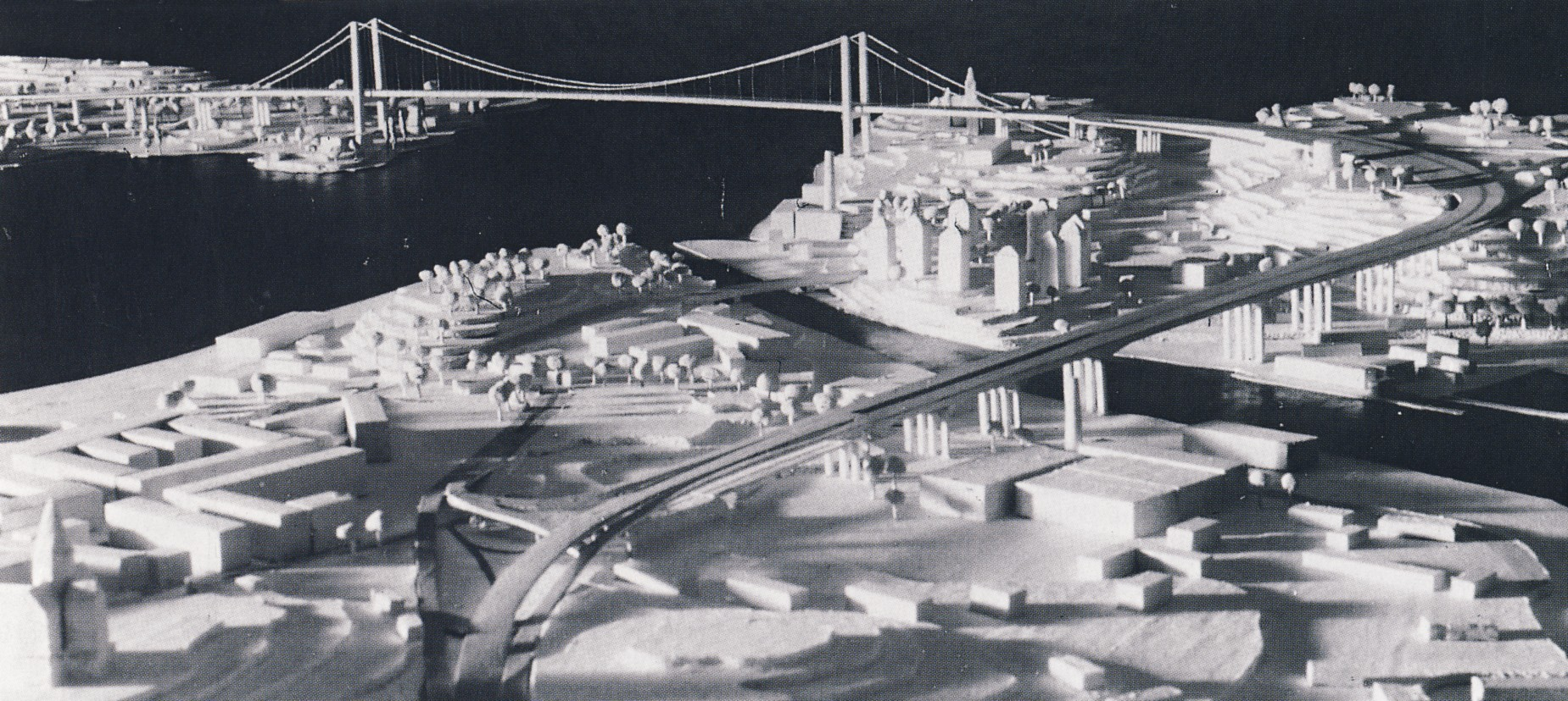 Österbro i Stockholm, modellfoto 1948. Tävlingsförslaget av Fritsch & Co, Heidelberg.